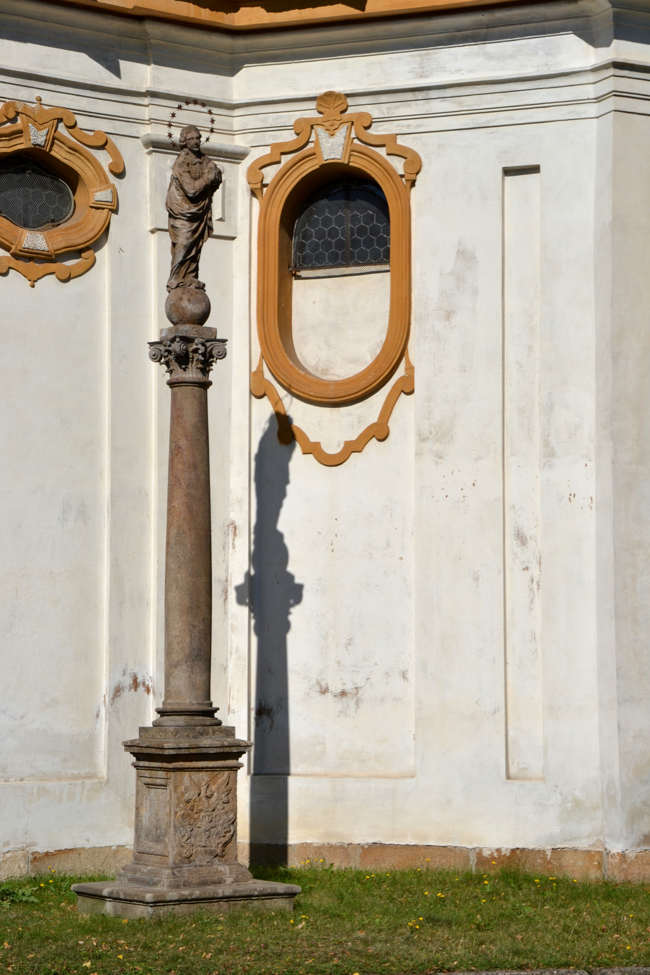 Sloup se sochou P. Marie (Vikletice), před kaplí sv. Anny, Vikletice